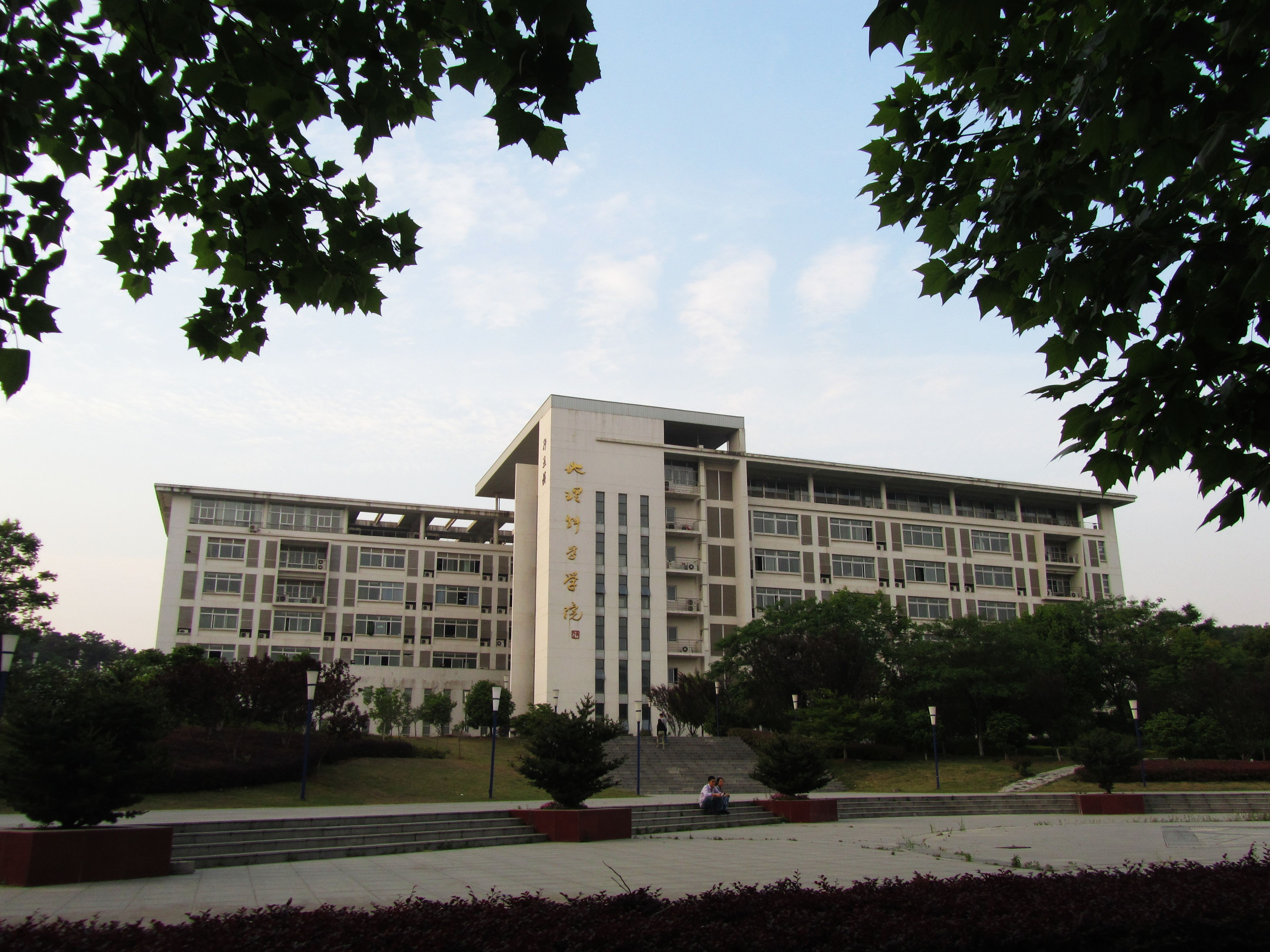 南京师范大学仙林校区地理科学学院。